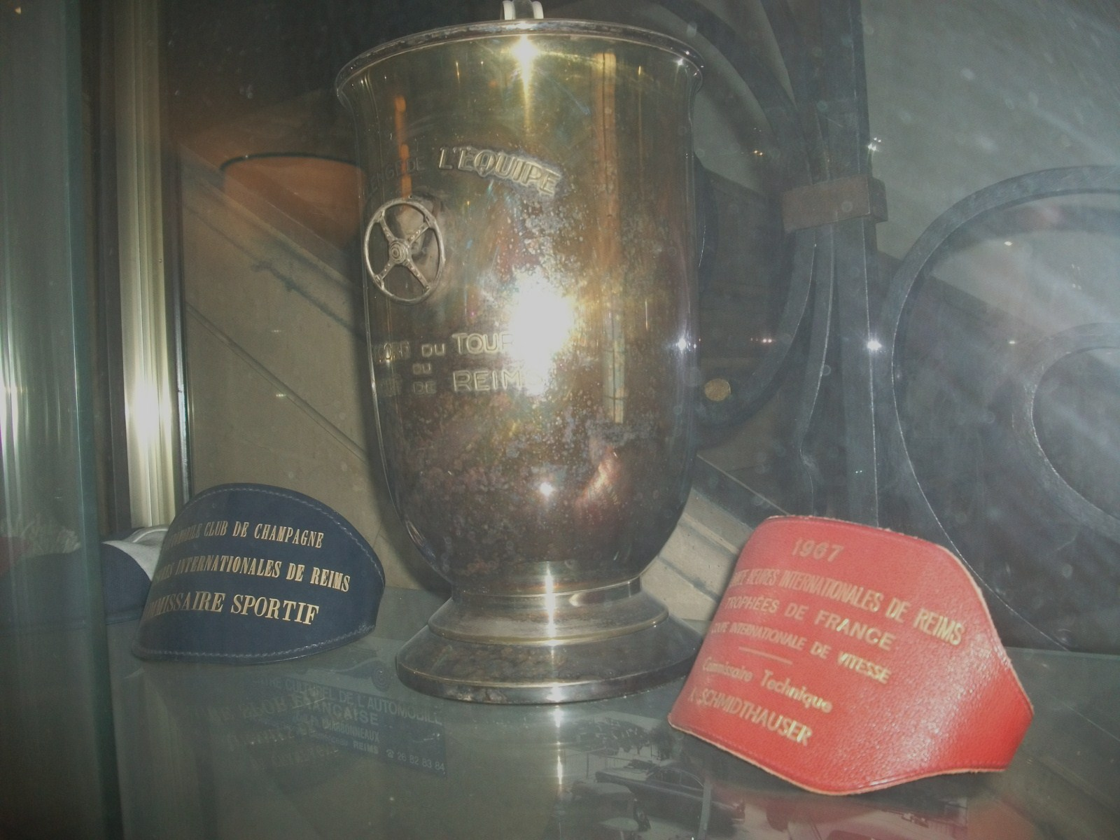 coupe du Challenge de l'équipe pour le recours du tour, dans la vitrine de l'automobile club de CHampagne.